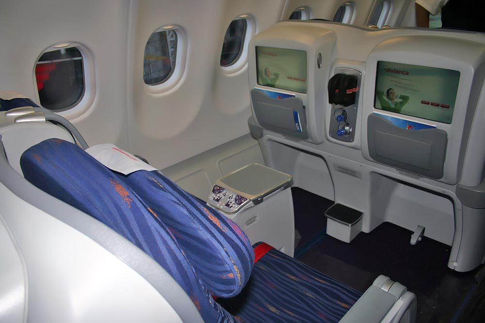 Vista de la cabina en la Clase Ejecutiva (Business Class) en los Airbus A330 de Avianca.